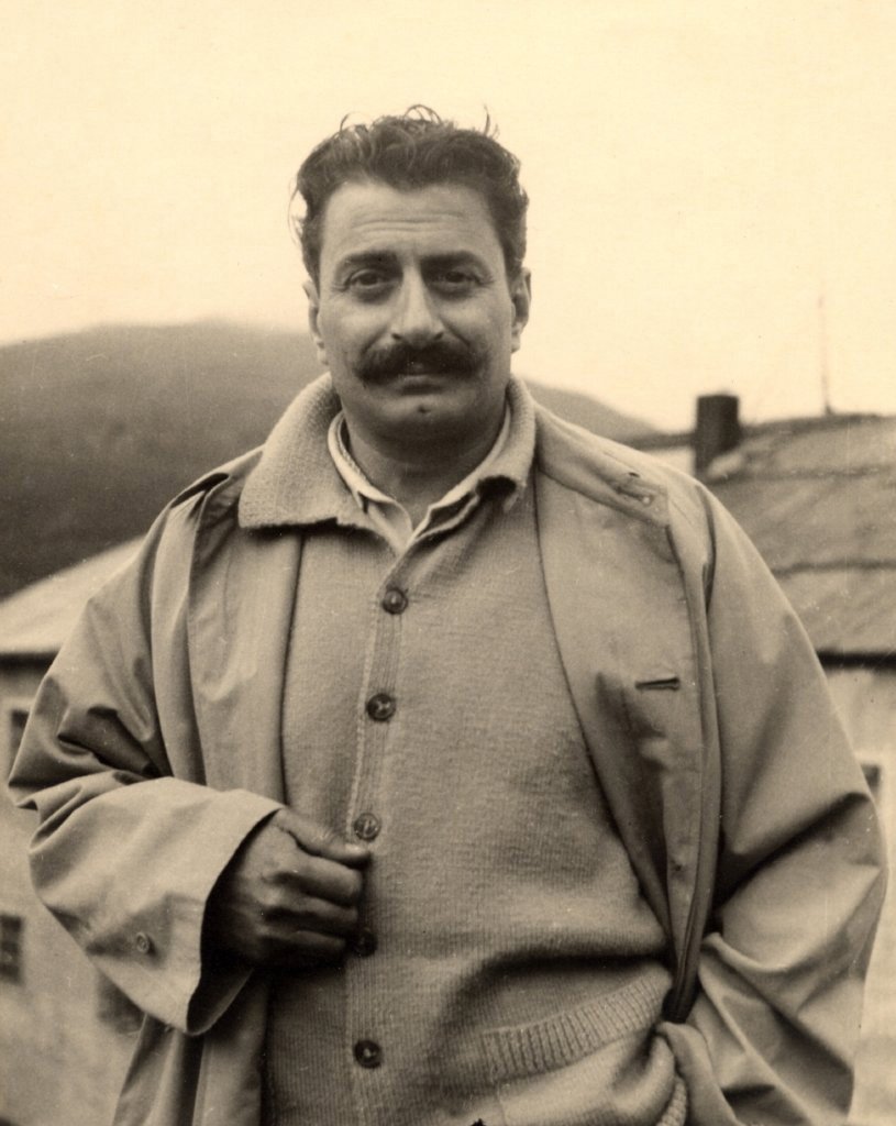 Giovannino Guareschi (1908-1968) in Valtellina